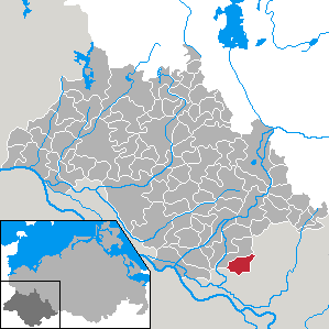 Steesow in Mecklenburg-Vorpommern - district Ludwigslust